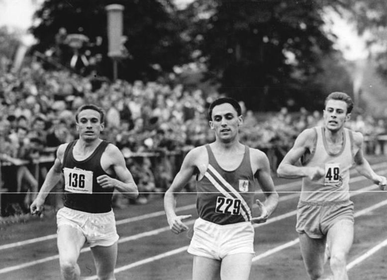 M. Matuschewski, Niephagen, Fassinger Zentralbild Kohls 31.8.1963 XIV. Deutsche Leichtathletik-Meisterschaften in Jena vom (30.8.-1.9.1963) UBz: Der Favorit für den 800-m-Lauf Europameister M. Matuschewski (Mitte-SC Turbine Erfurt) setzte sich bereits in den Vorläufen überzeugend durch. Links: Niephagen (SC Dynamo) und rechts: Fassinger (ASK Vorw. Berlin) .